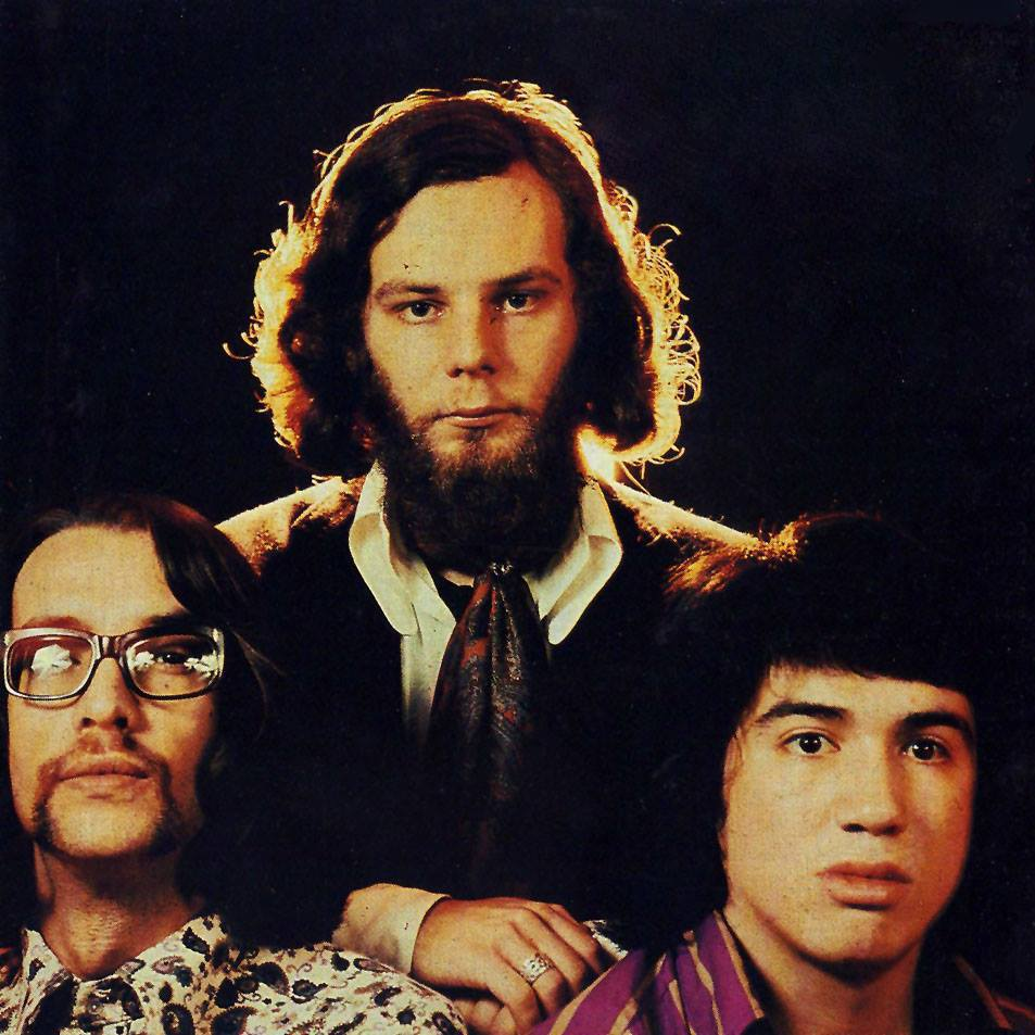 Es una foto de uno de los primeros grupos de Rock argentino, Manal.